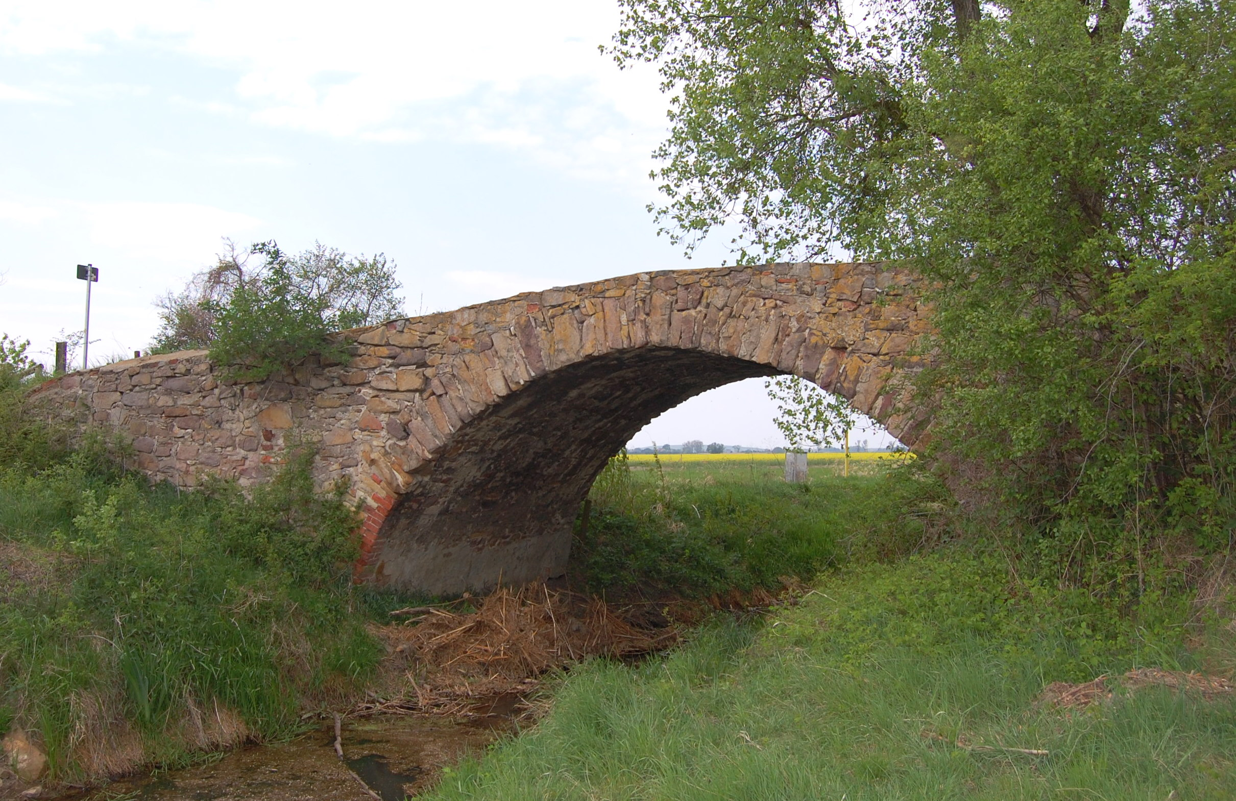 Klusbrücke, westlicher Bogen